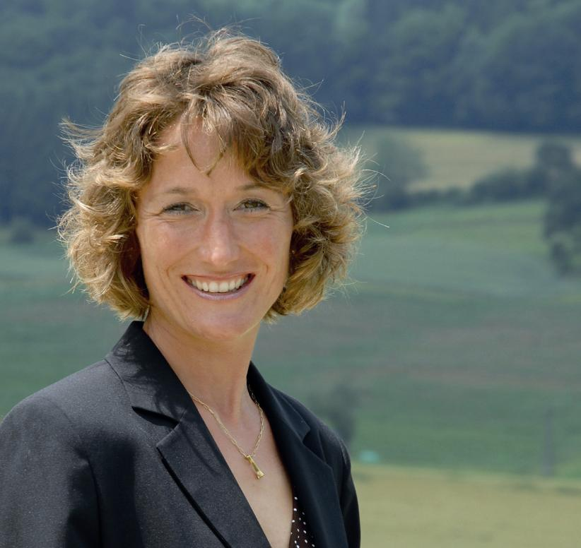 Wahlfoto von Susanne Hochuli für die Regierungsratswahlen des Kantons Aargau 2008